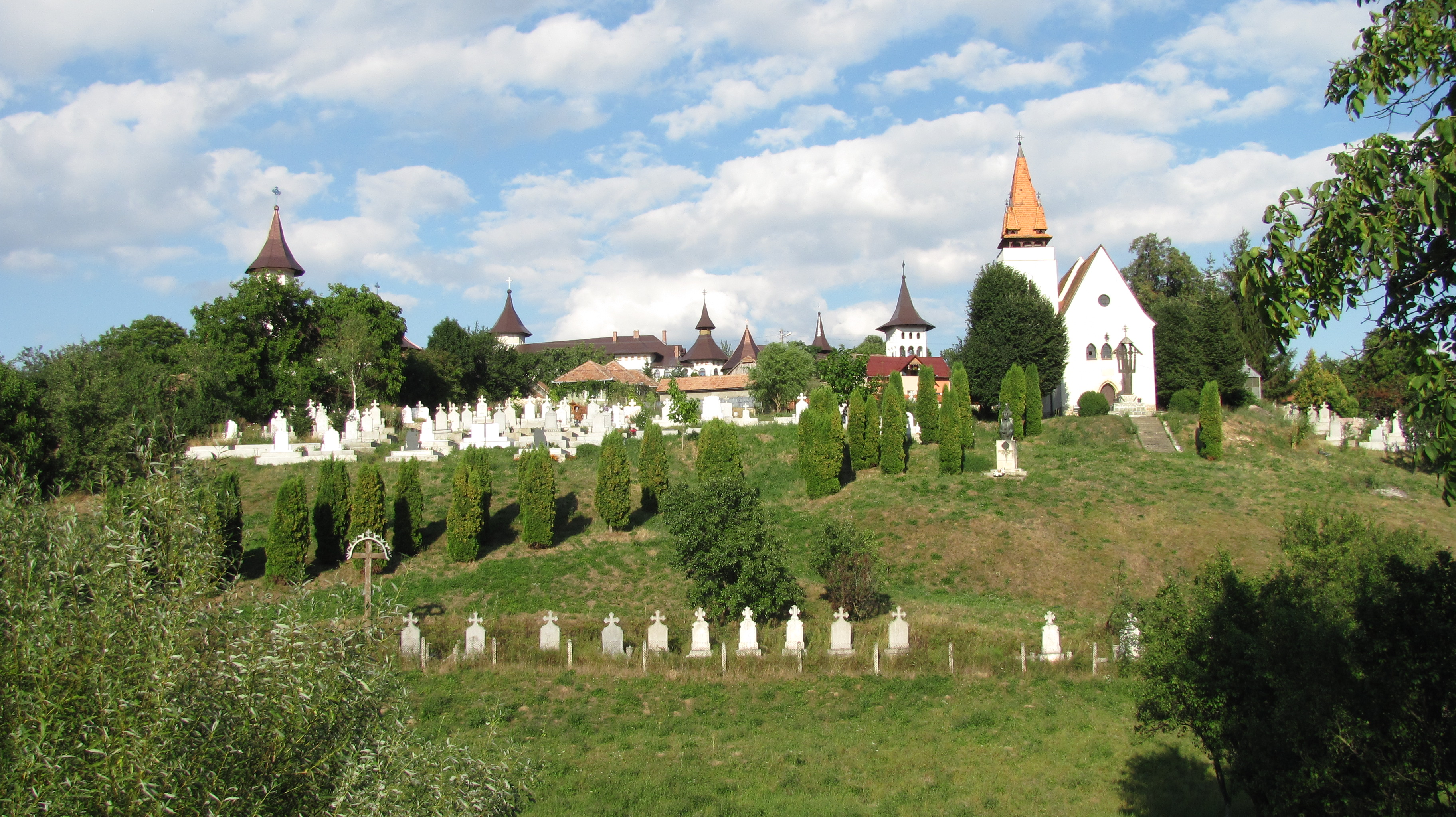 Feleacu, biserica ortodoxă "Sf.Paraschiva" (până în anul 1948 biserică greco-catolică cu hramul “Adormirea Născătoarei de Dumnezeu”).